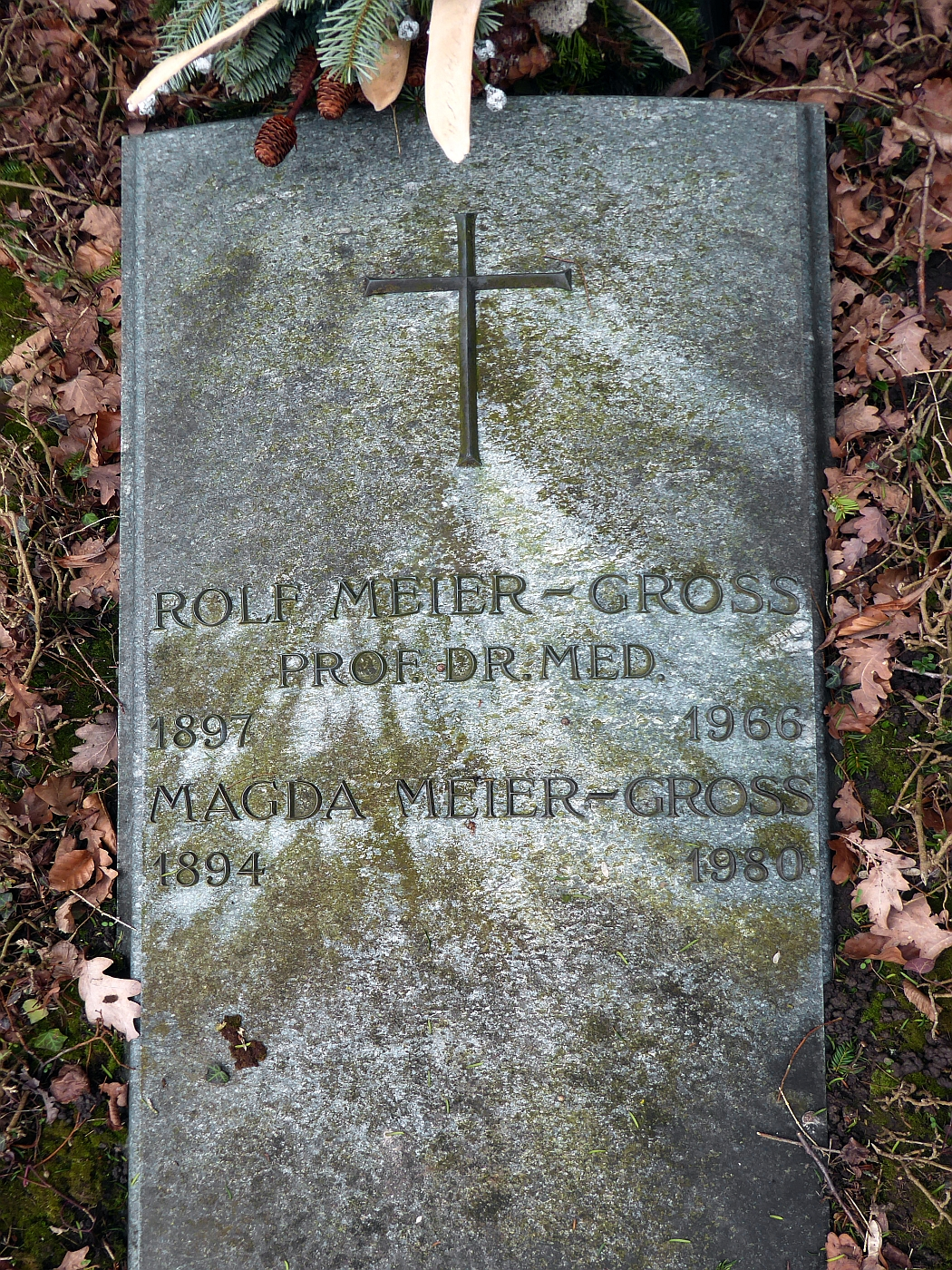 Rolf Meier-Gross (1897–1966) Prof. Dr.med., Chemiker, Leiter des pharmakologisch-biologischen Instituts der Gesellschaft für Chemische Industrie in Basel (Ciba), Grab auf dem Friedhof Hörnli, Riehen, Basel-Stadt